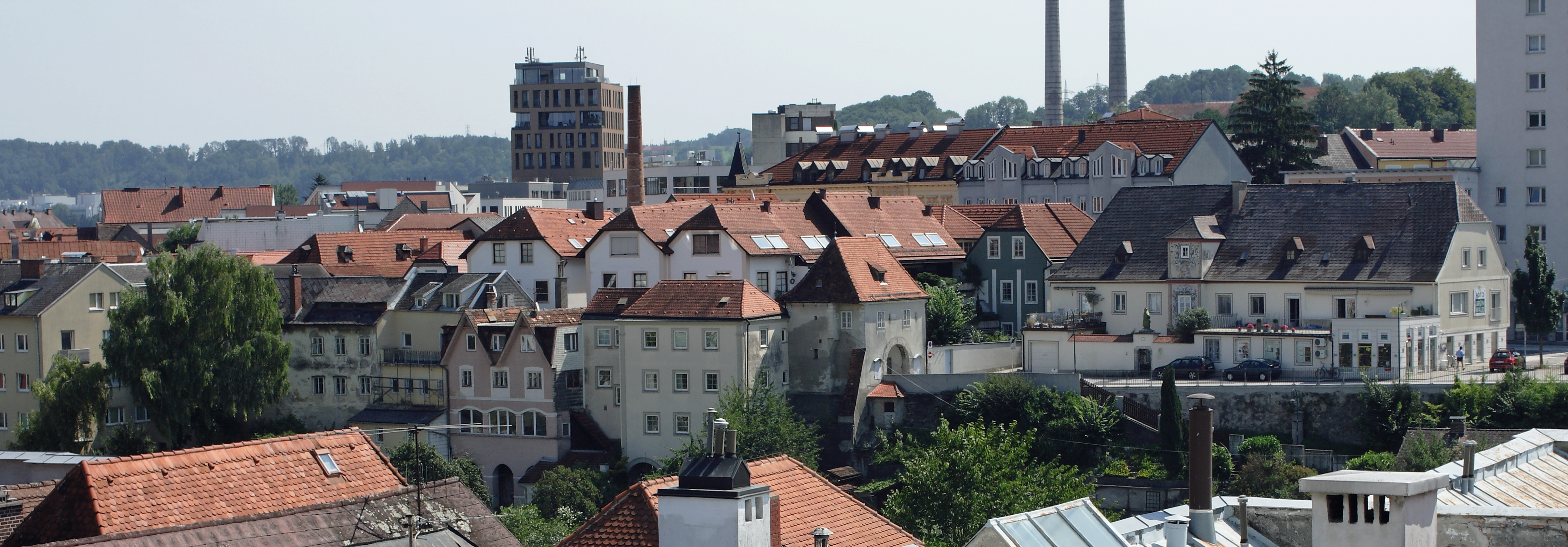 Blick von der Dachterrasse des Steyrer Hartlauerhauses auf Ennsdorf